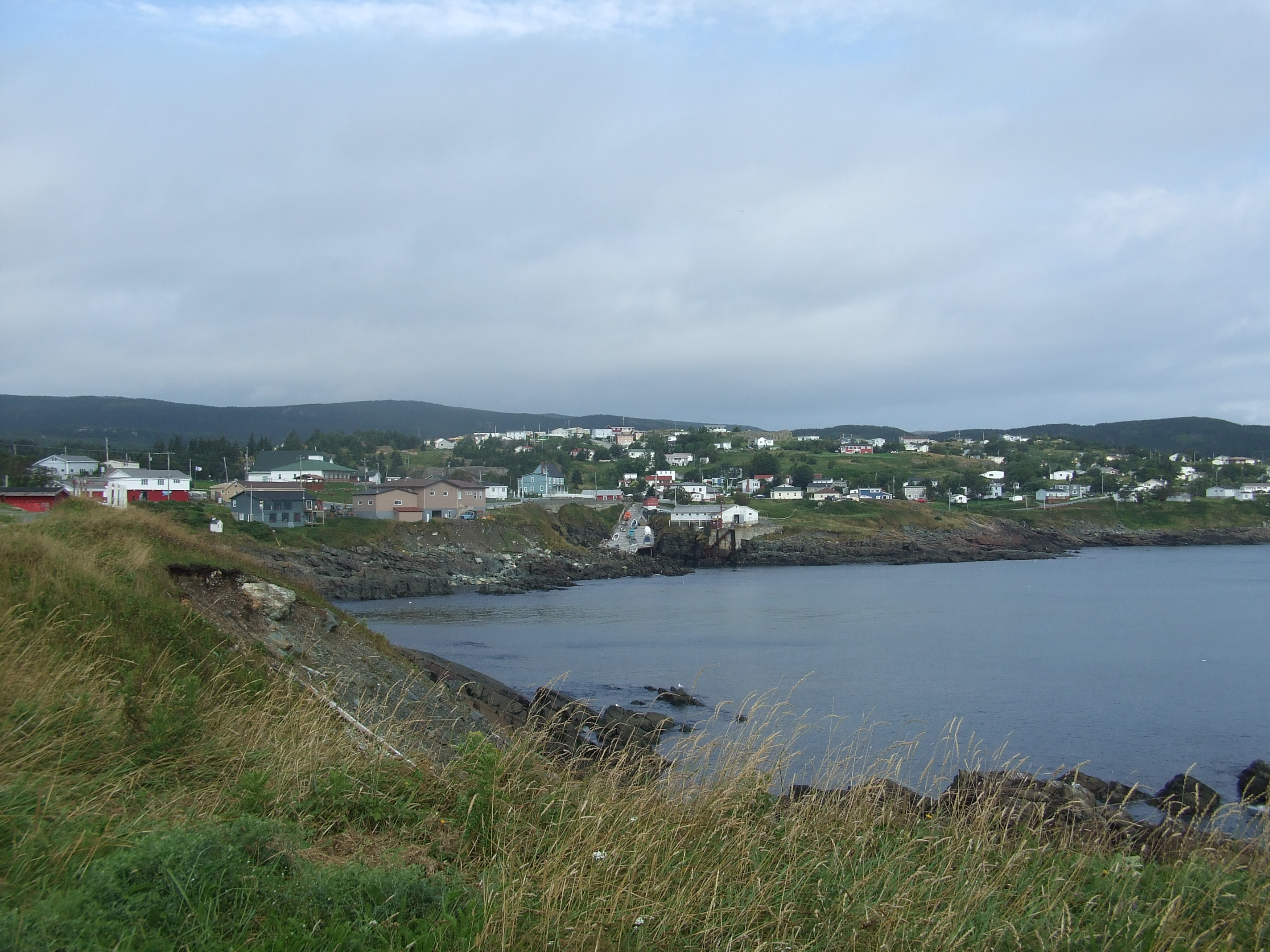 Vue de Pouch Cove depuis l'autre côté de la baie